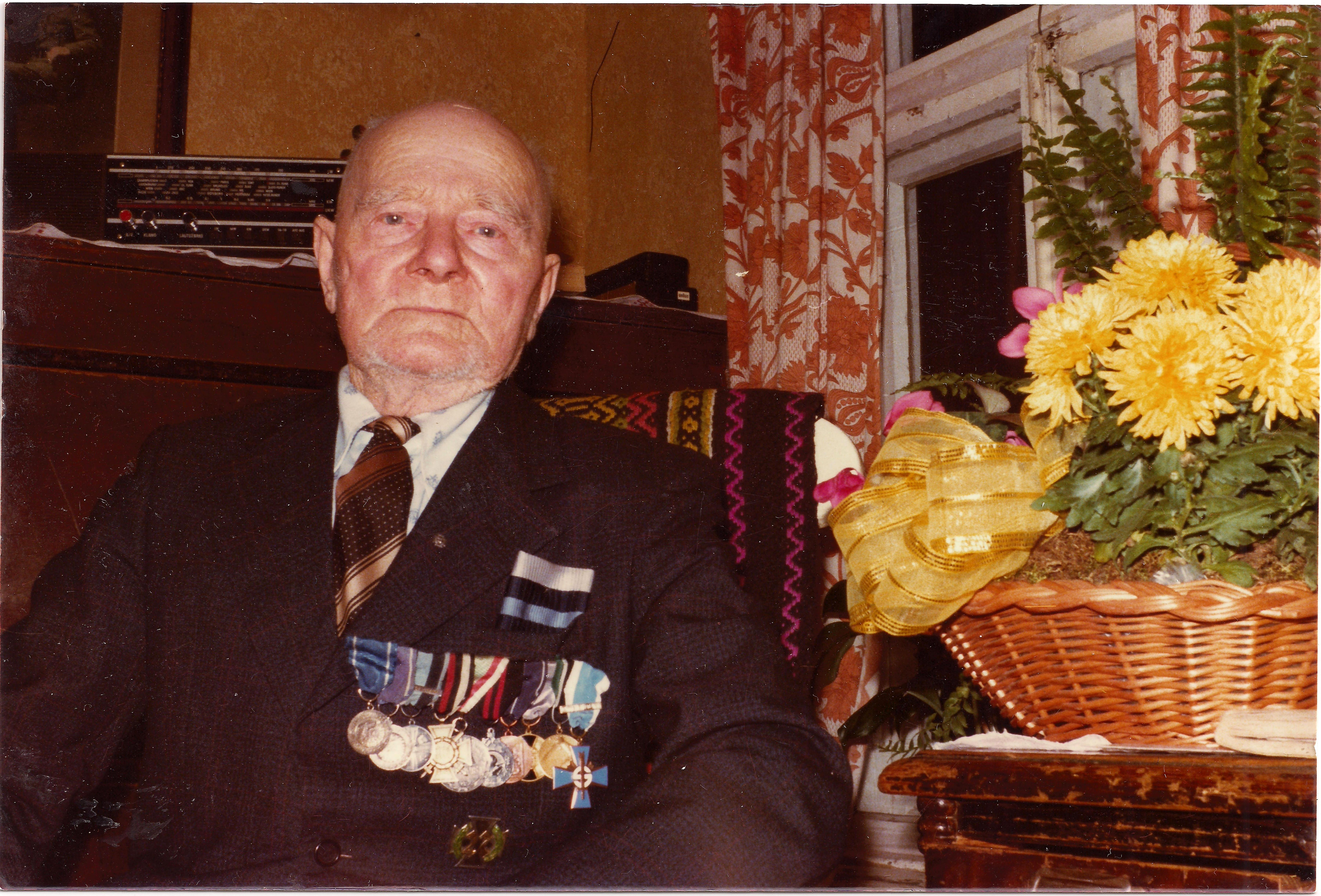 Paavo Haanpää 20.11.1978.